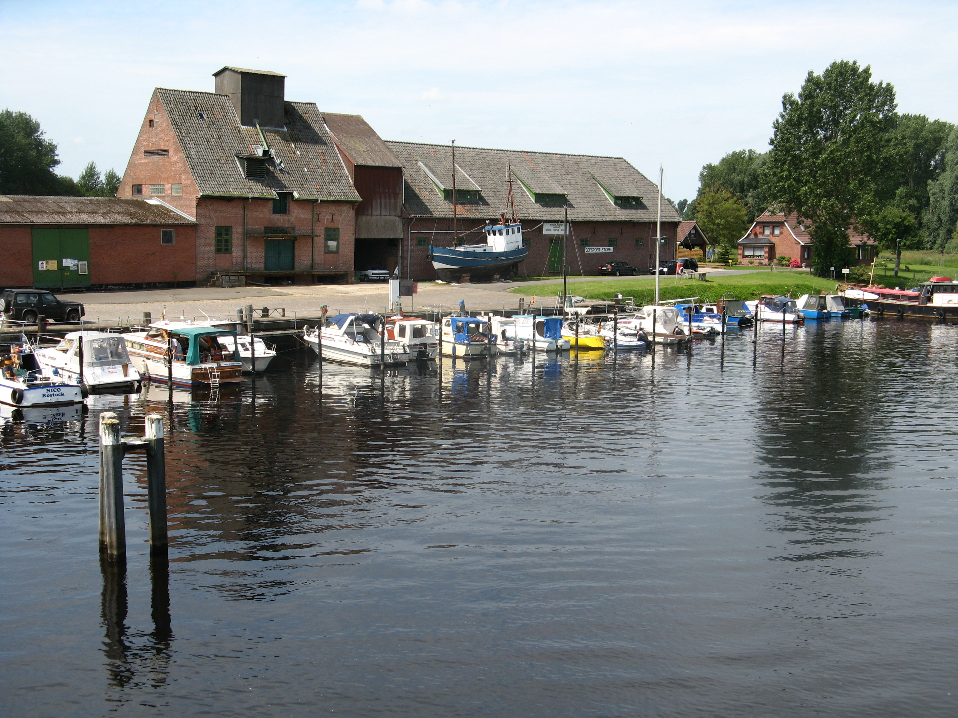 Pahlen